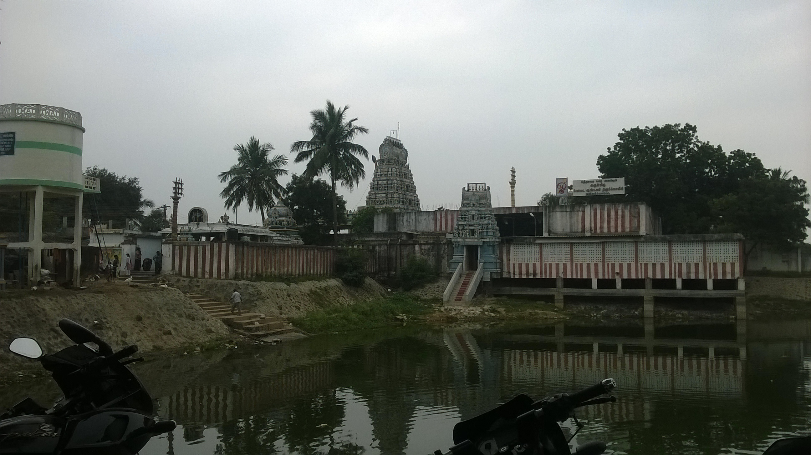 Vallakottai Temple Theppa kulam